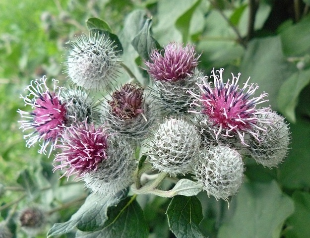 Соцветия лопуха большого. Фото путешествия по Беларуси.